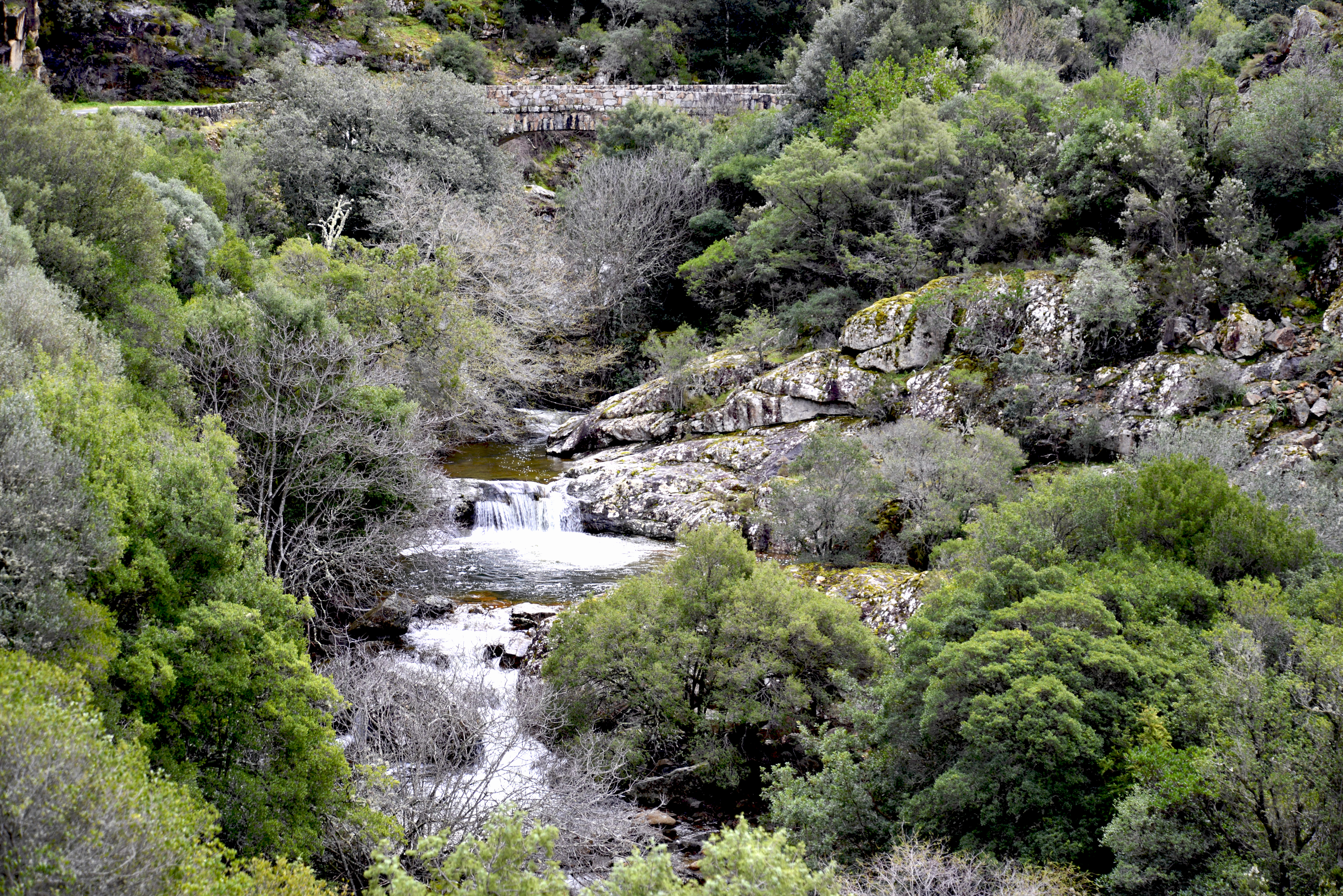 Galéria, Filosorma (Haute-Corse) - Le ruisseau de Tetti au pont de Calancone de la route D81